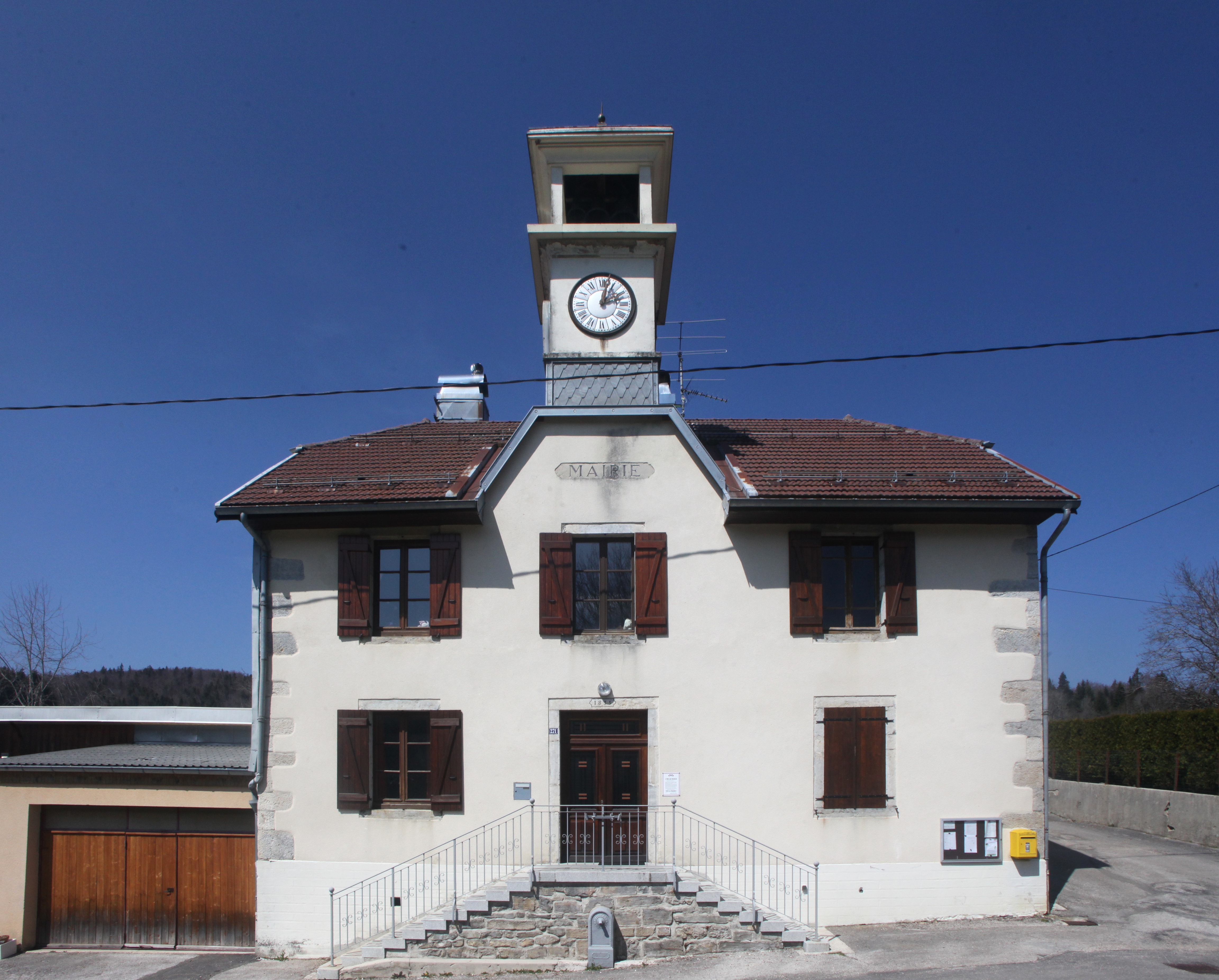 Mairie d'Entre-deux-Monts.